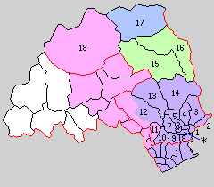 高知県土佐郡の町村制時点の町村。